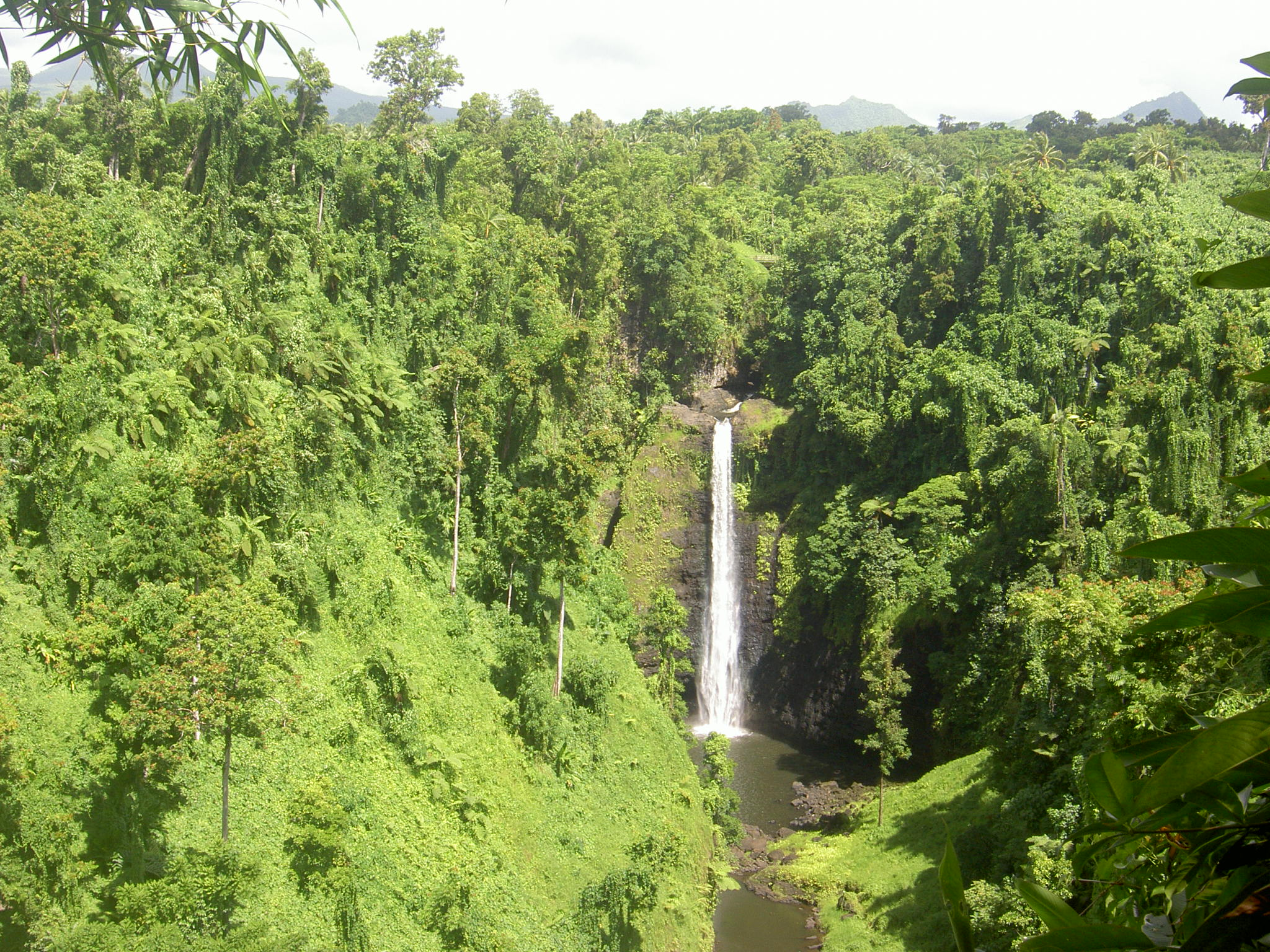 Der Sopoaga-Wasserfall auf Samoa (Upolu) selbst aufgenommen im Januar 2005 --Plenz 12:27, 9 December 2006 (UTC)